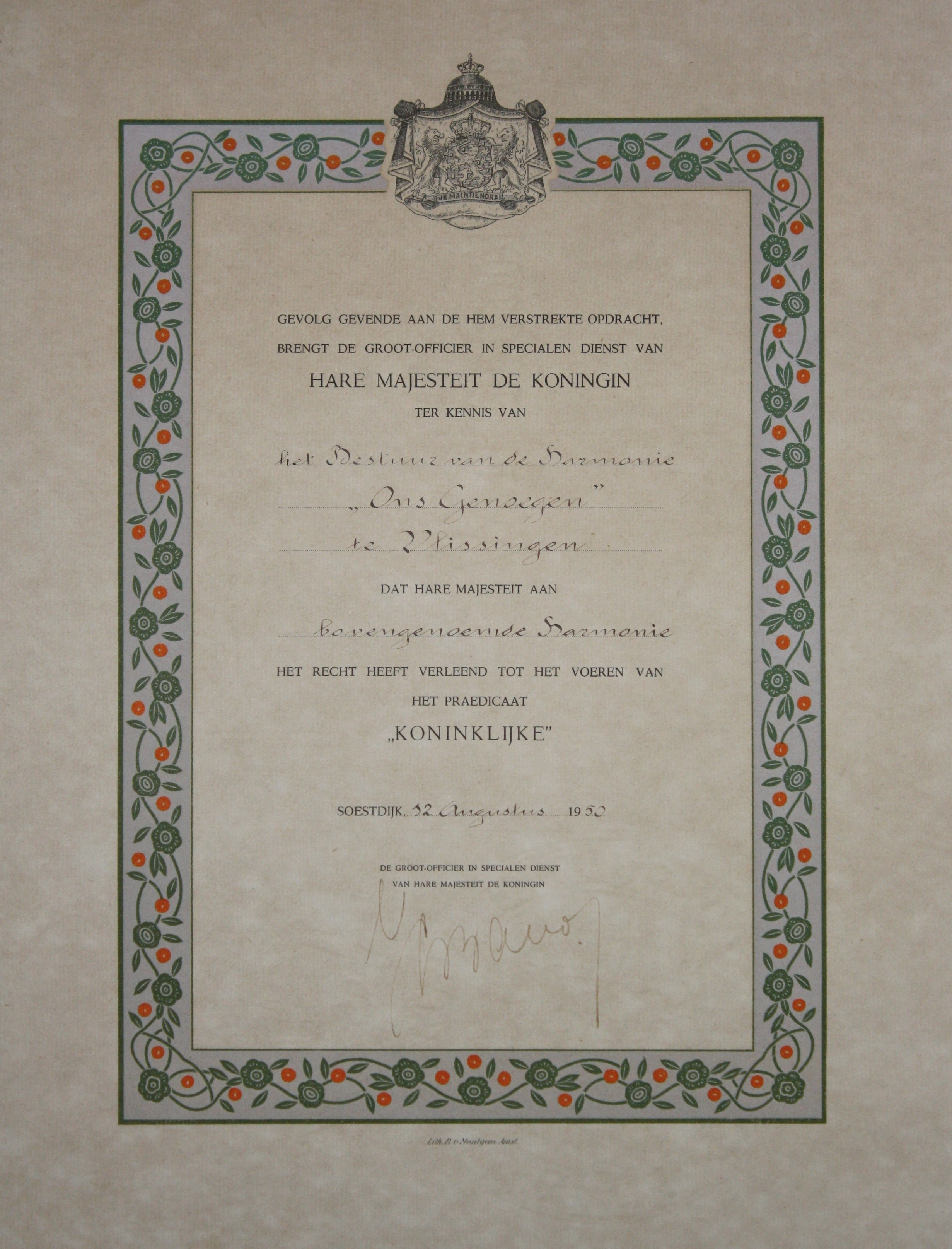 OorkondeGevolggevende aan de hem verstrekte opdracht,brengt de groot-officier in specialen dienst vanHM Koningin Julianater kennis vanhet Bestuur van de HarmonieOns Genoegen te Vlissingendat Hare Majesteit aanbovengenoemde Harmoniehet recht heeft verleend tot het voeren vanhet praedicaat "Koninklijk"Soestdijk12 augustus 1950de groot-officier in specialen dienst van Hare Majesteit de Koningin